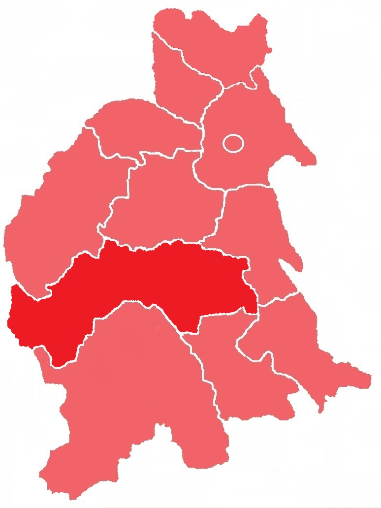 Радівецький повіт